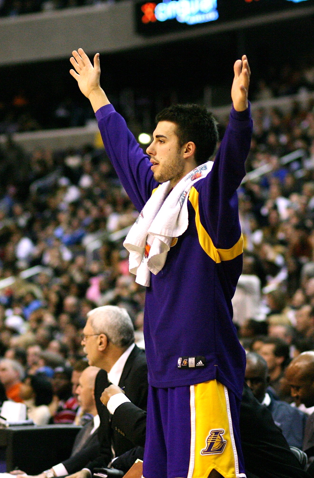 Sasha Vujacic